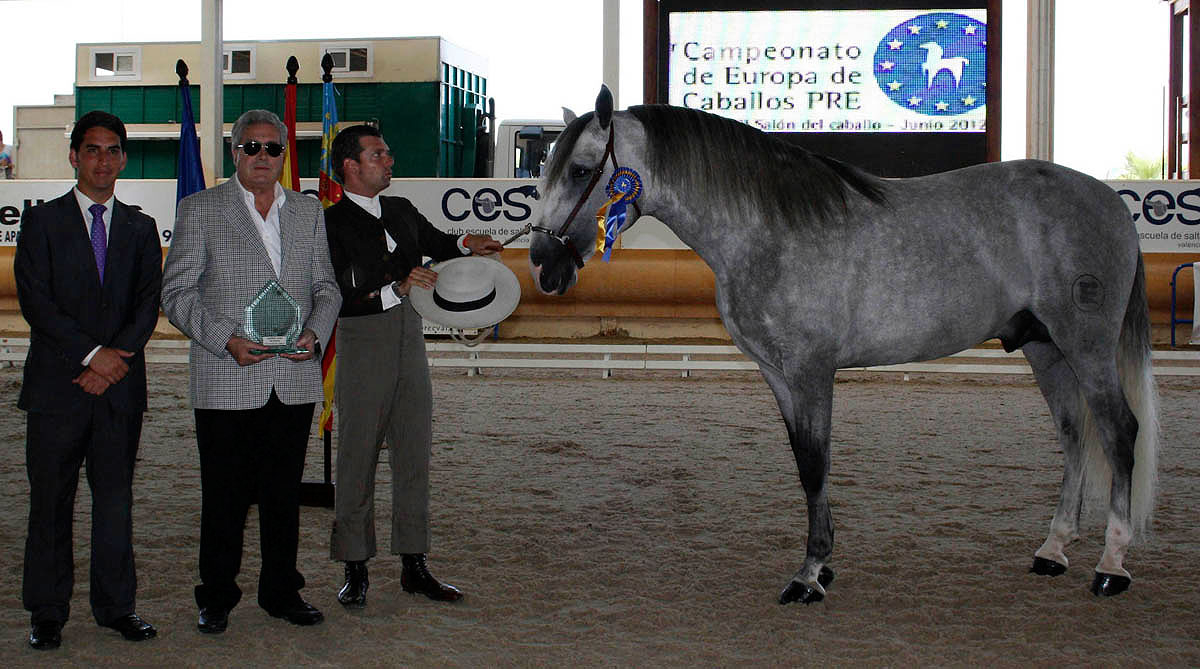 PRE gris présenté à Valence en avril 2013.